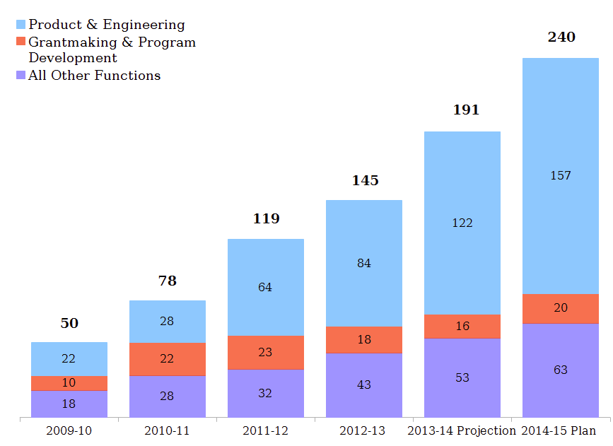 Wachstum der WMF-Mitarbeiterzahl seit 2009, mit Planung für 2014/15